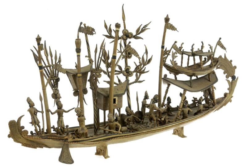 Scheepsmodel. Dergelijke schepen worden gebruikt door de Ngaju Dayaks voor de dodenfeesten (Tiwah).. Model van een zielenboot Unknown language: Banama tingang